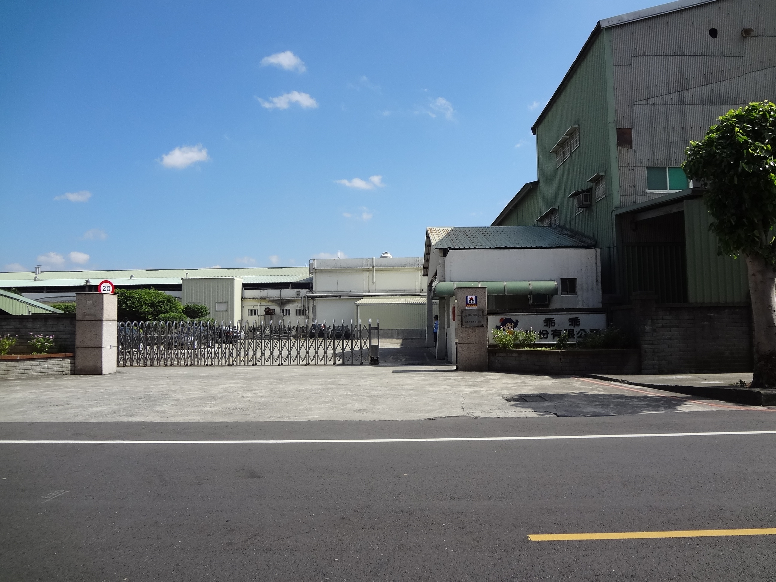 乖乖公司中壢廠，地址：桃園縣中壢市東園路48號。